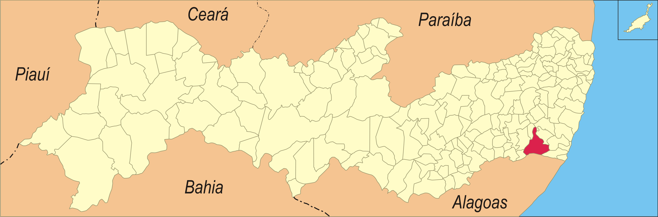 Localização da cidade no estado de Pernambuco